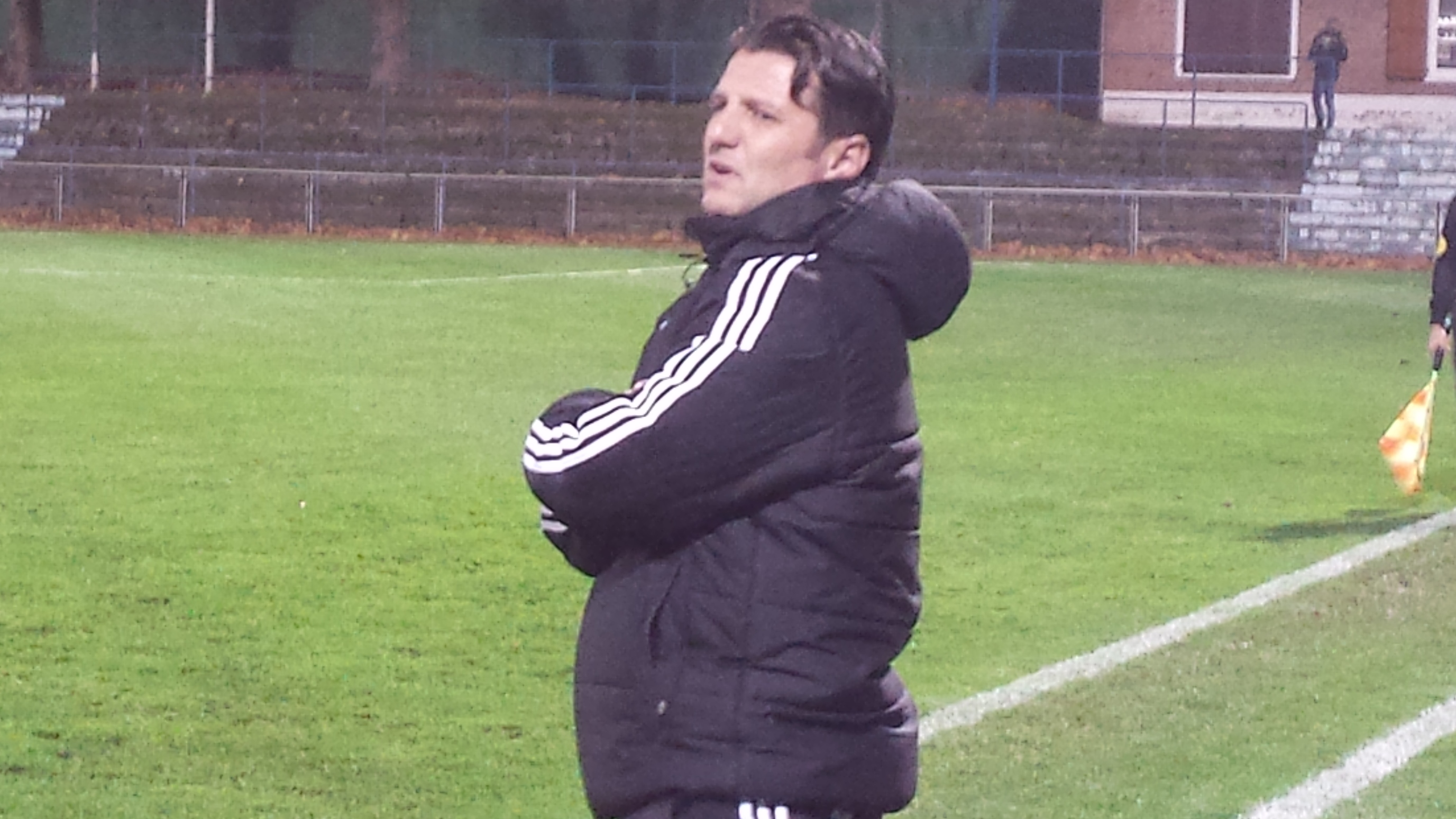 Xavier Dudoit lors du match Lens B - Romorantin, au Stade François Blin d'Avion, comptant pour la onzième journée de CFA Groupe A (Quatrième division française) de football.